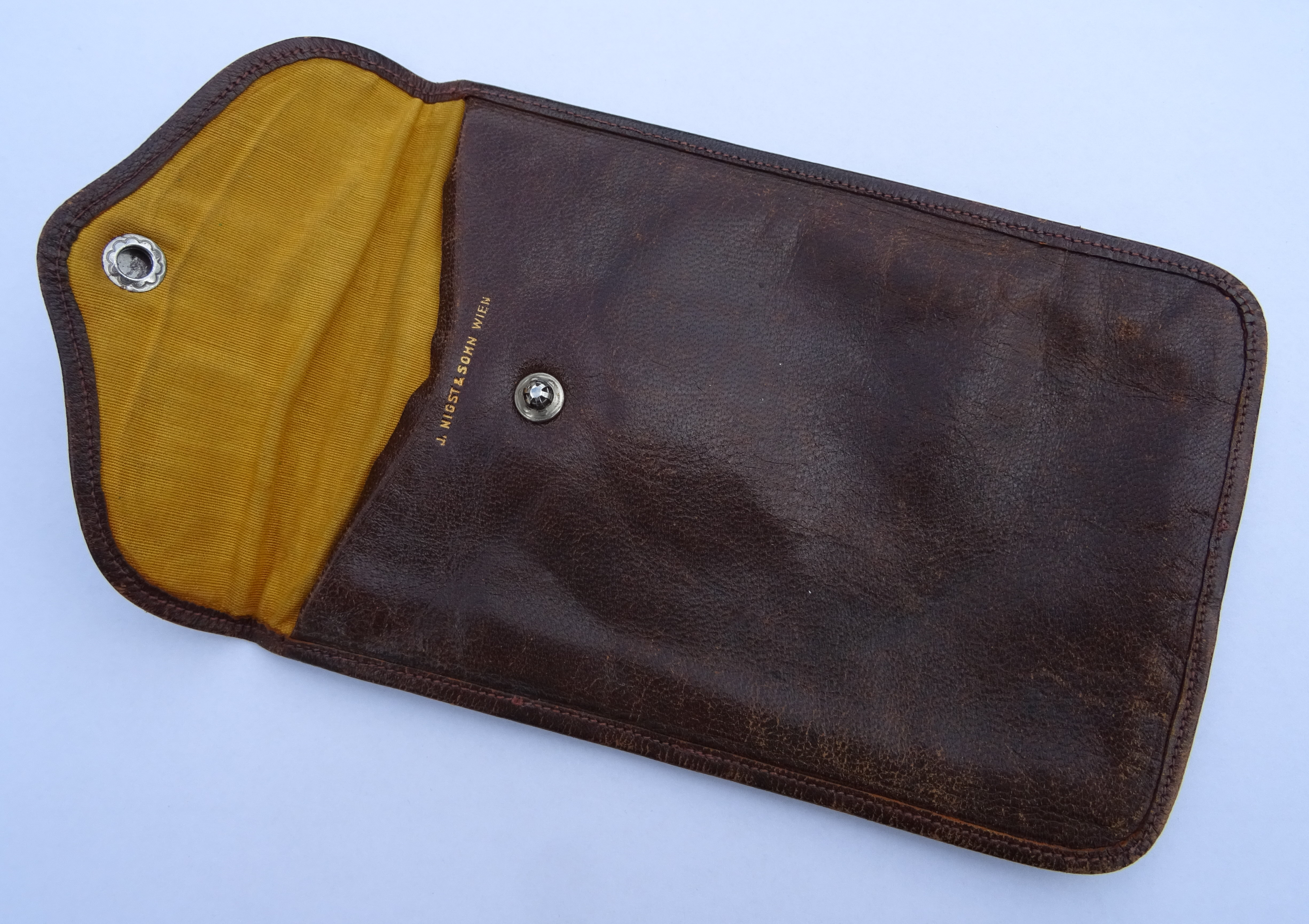 Lederen enveloppe of mapje, rond 1900 gemaakt door de Firma J. Nigst & Zoon uit Wenen, voor het persoonlijk (laten) transporteren van -vaak vertrouwelijk en/of belangrijke- brieven.